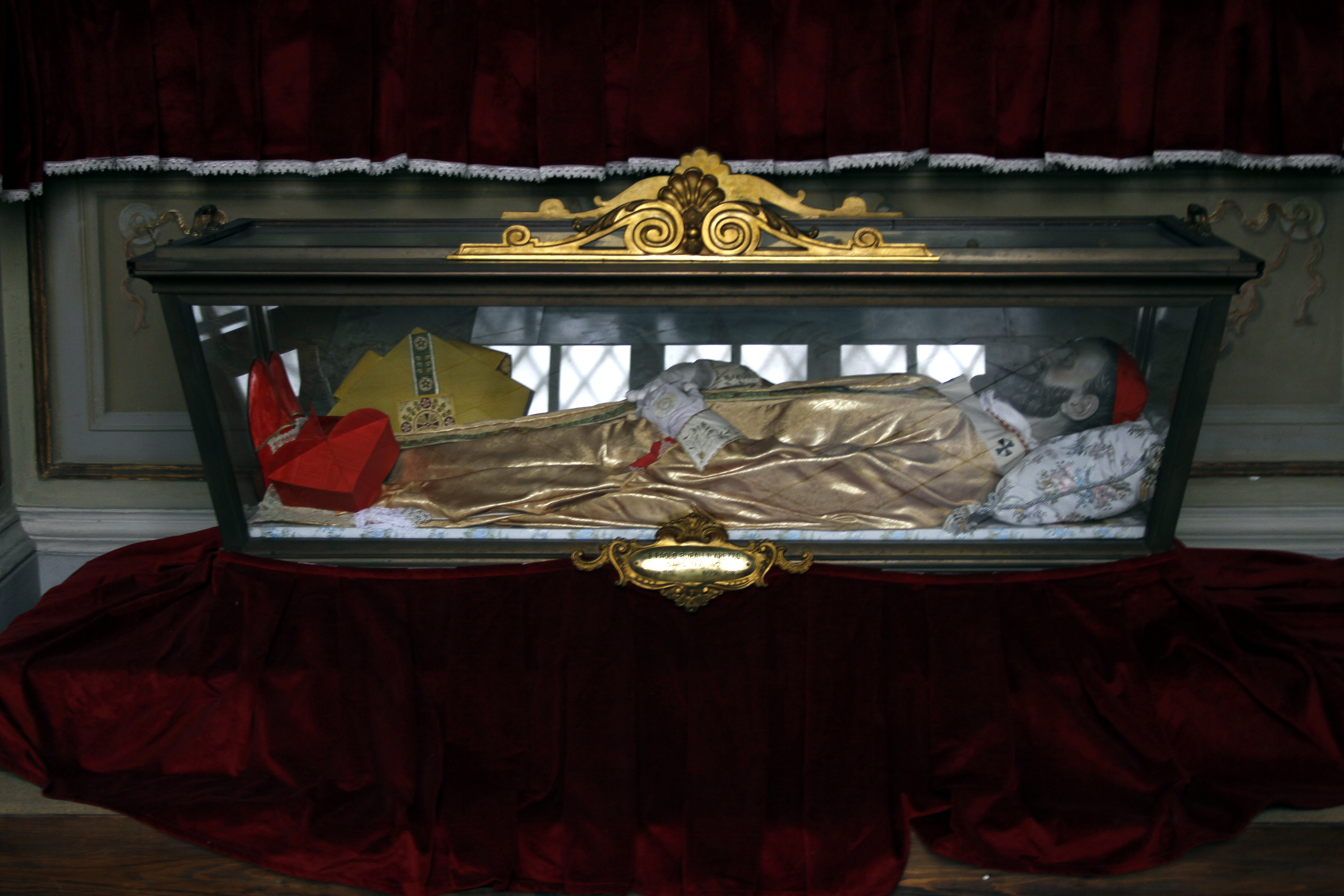 San Paolo Maggiore, Nápoles